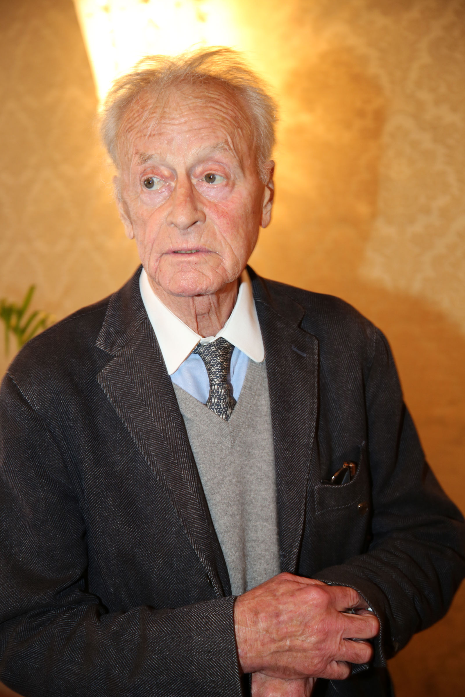 Helmuth Lohner, Schauspieler und Theaterregisseur